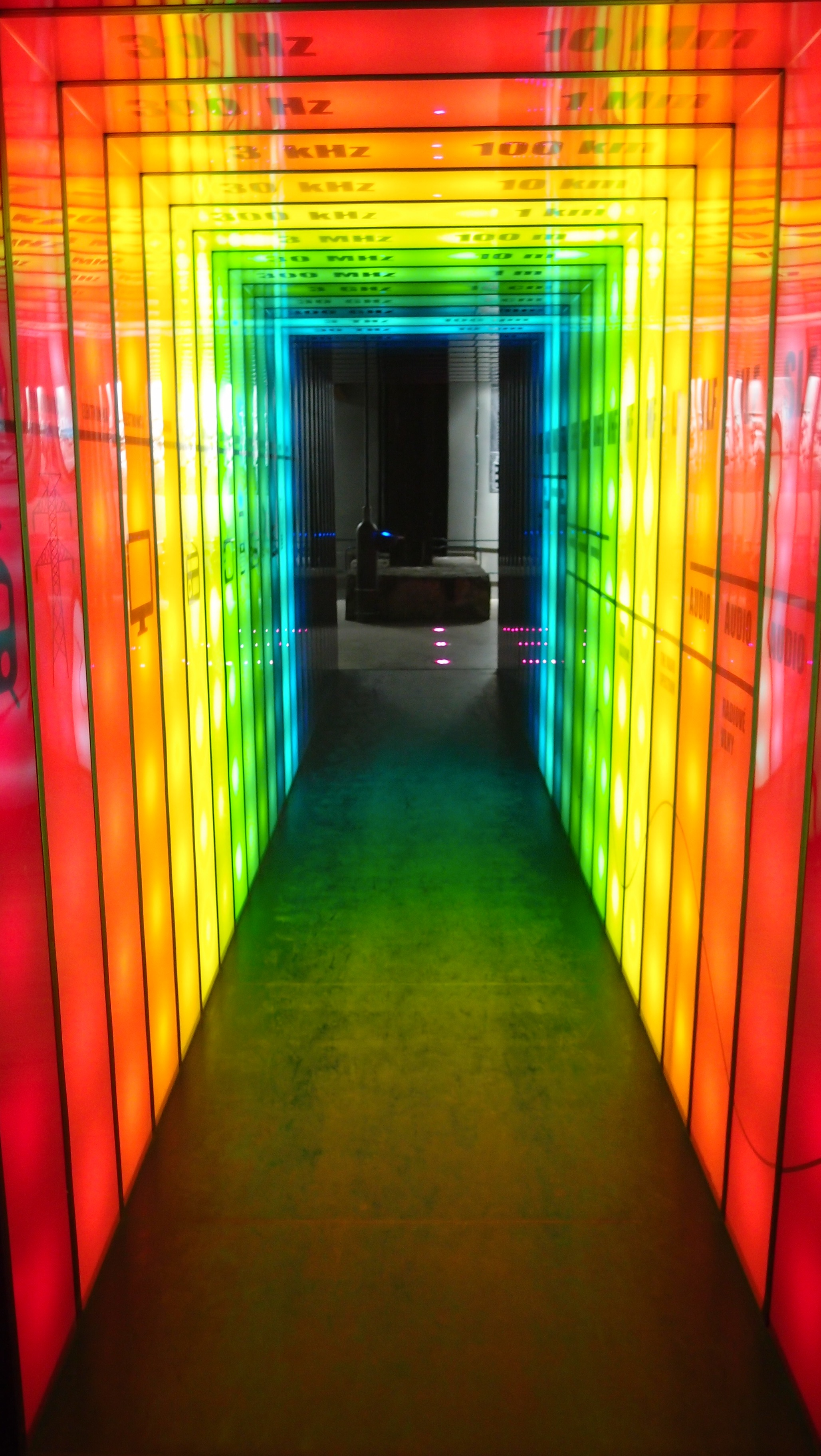 Frekvenční tunel, jeden z exponátů Malého světa techniky U6.